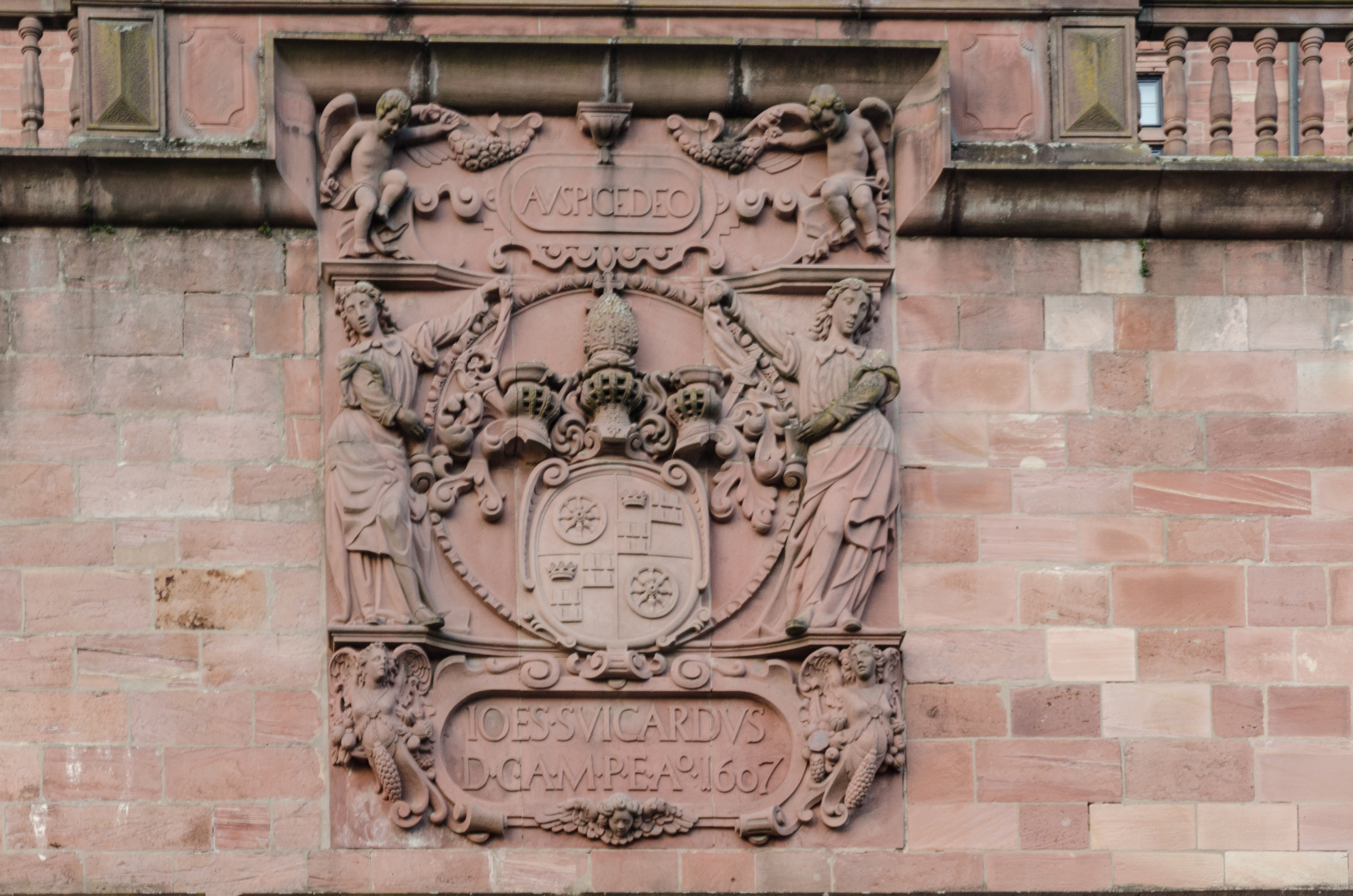 Schloss Johannisburg in Aschaffenburg